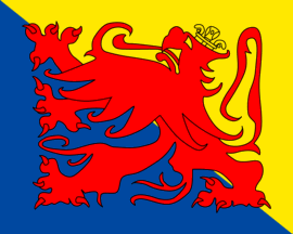 Sint-Truiden.